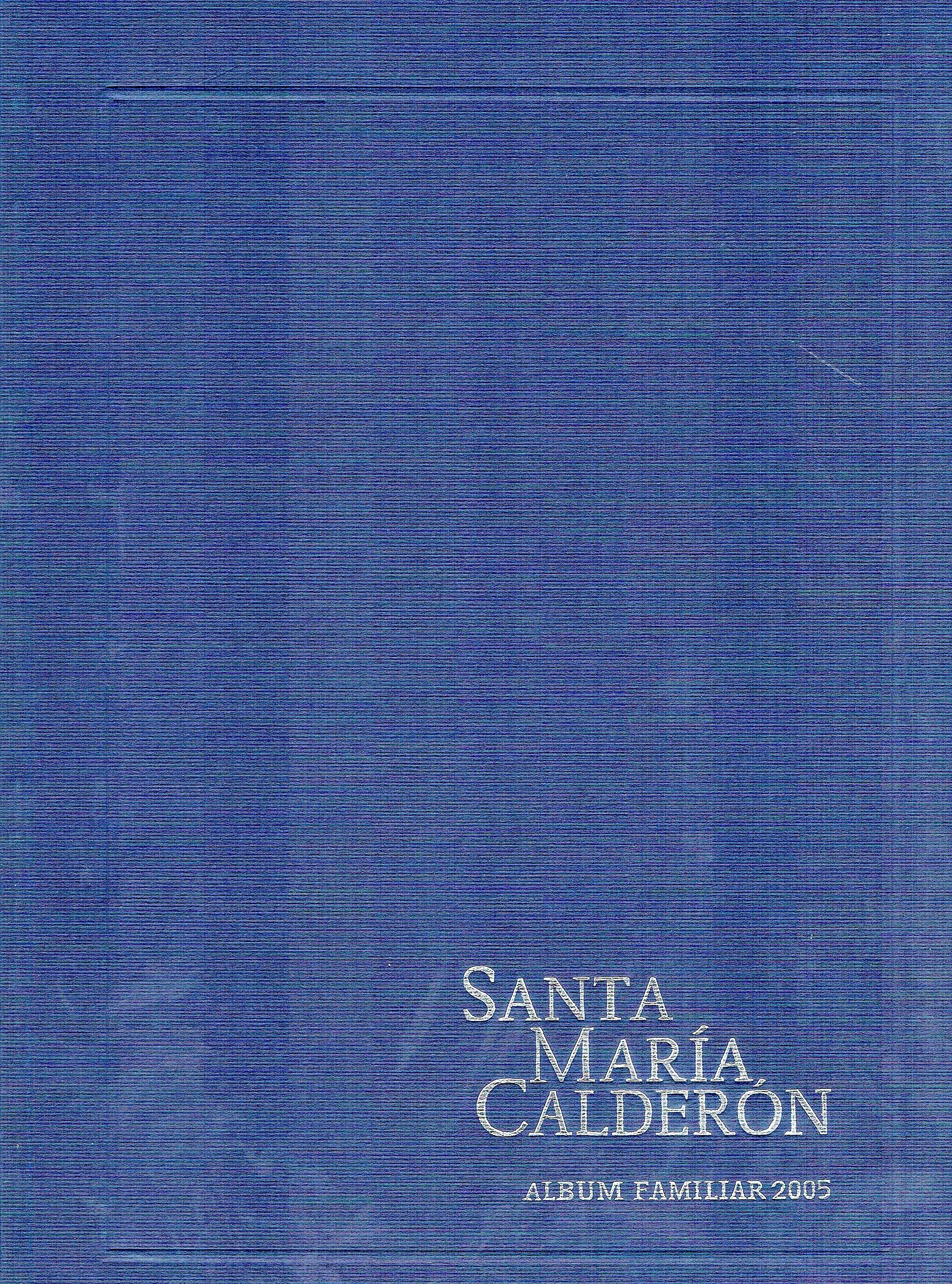 ALBUM FAMILIAR